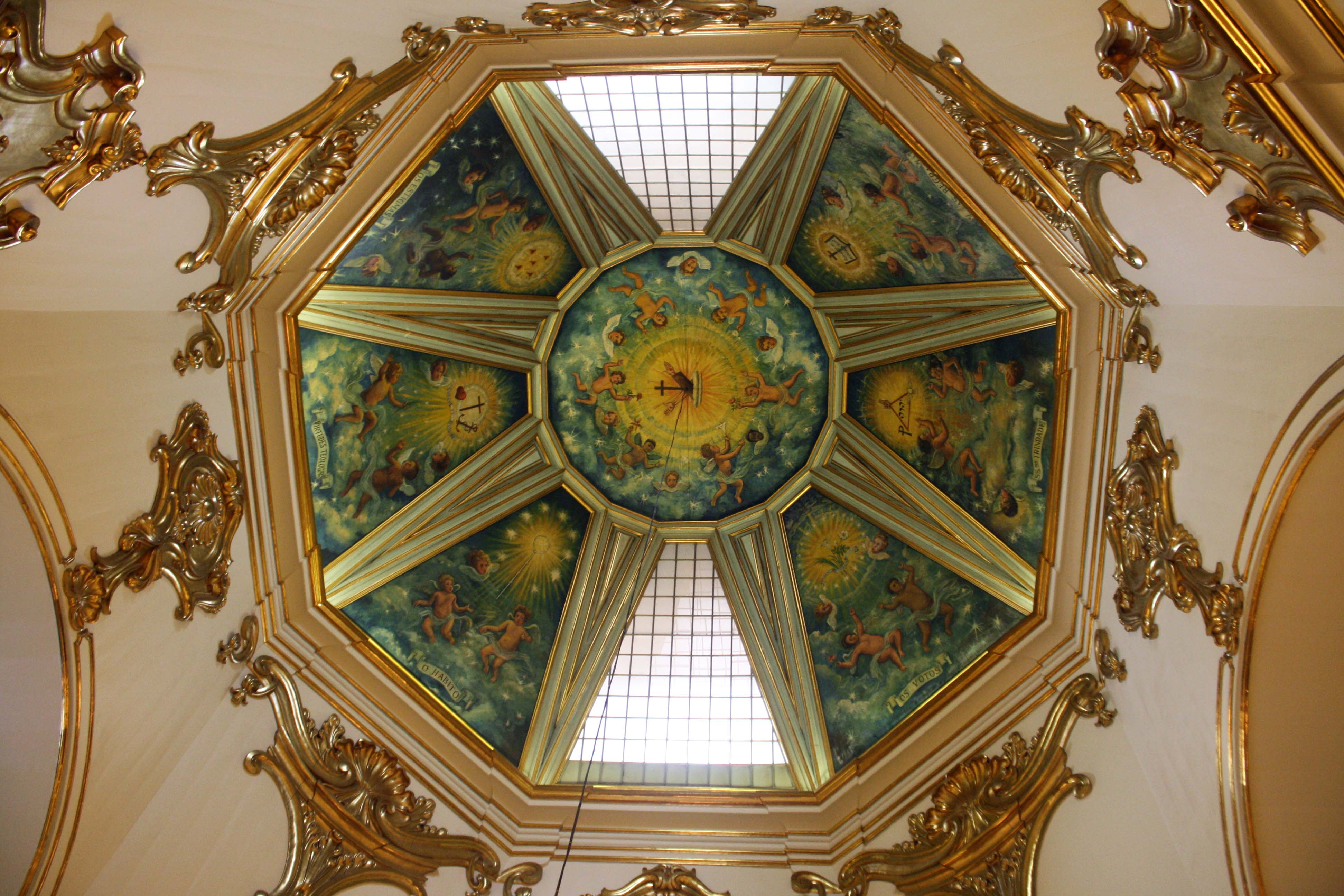 Detalhe da cúpula na Igreja das Chagas do Seráfico Pai São Francisco, em São Paulo (SP), Brasil